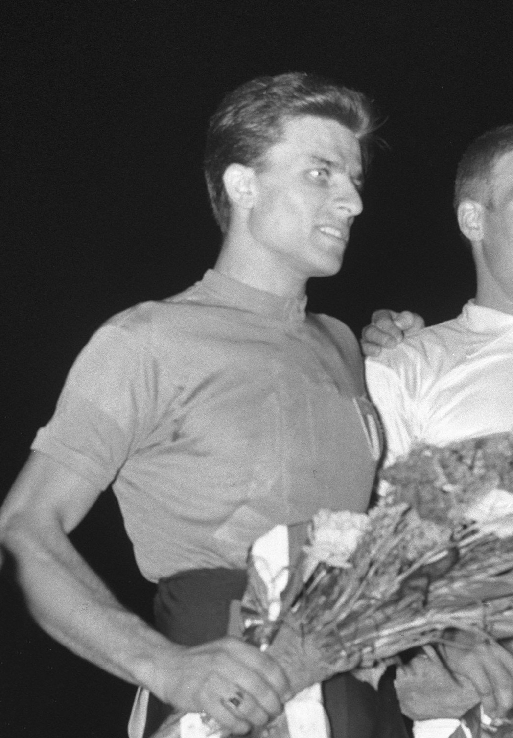 Wereldkampioenschap wielrennen op de baan in Amsterdam. Achtervolging Amateurs. Mario Valotto (It.) 2e